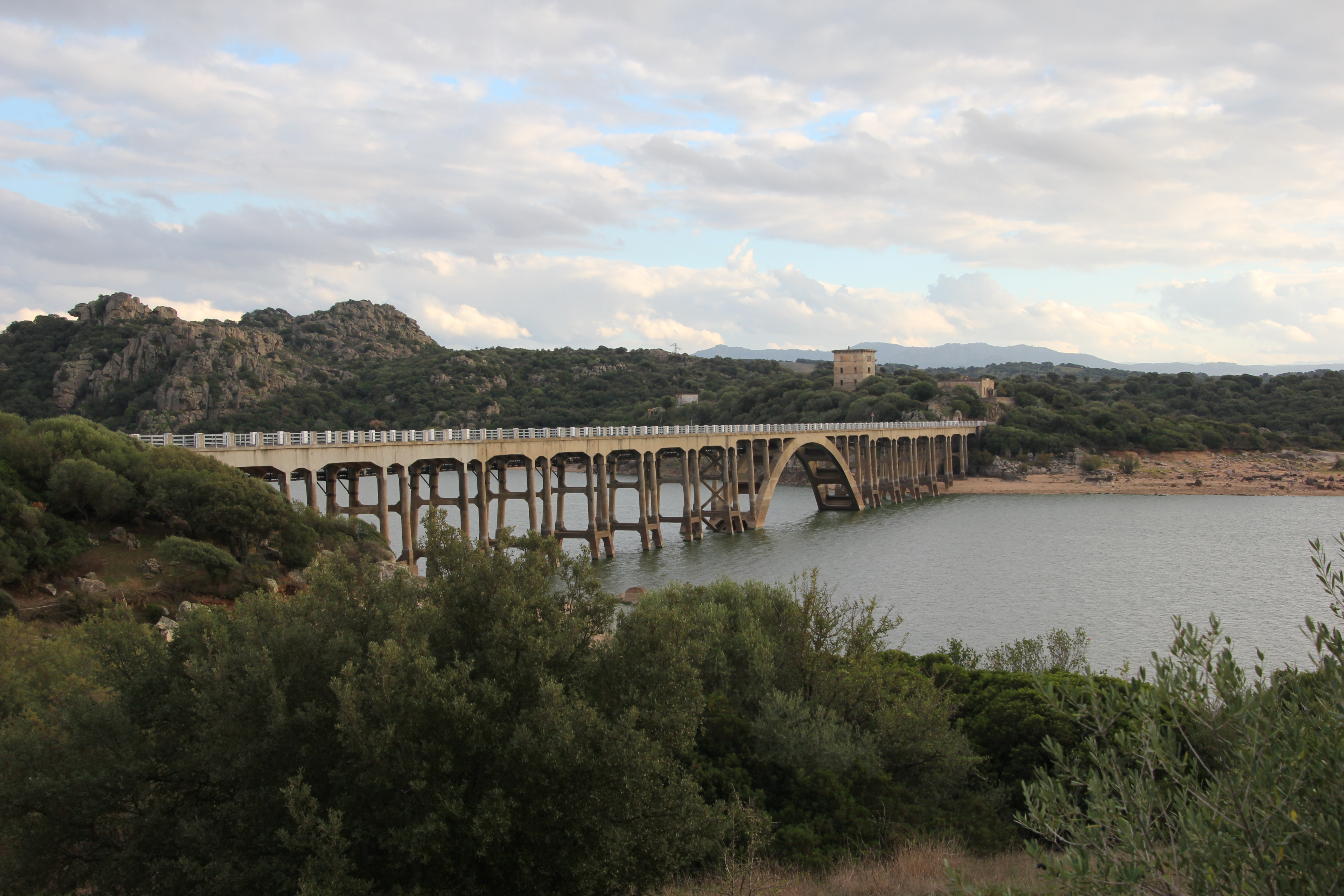 Oschiri - Ponte Diana